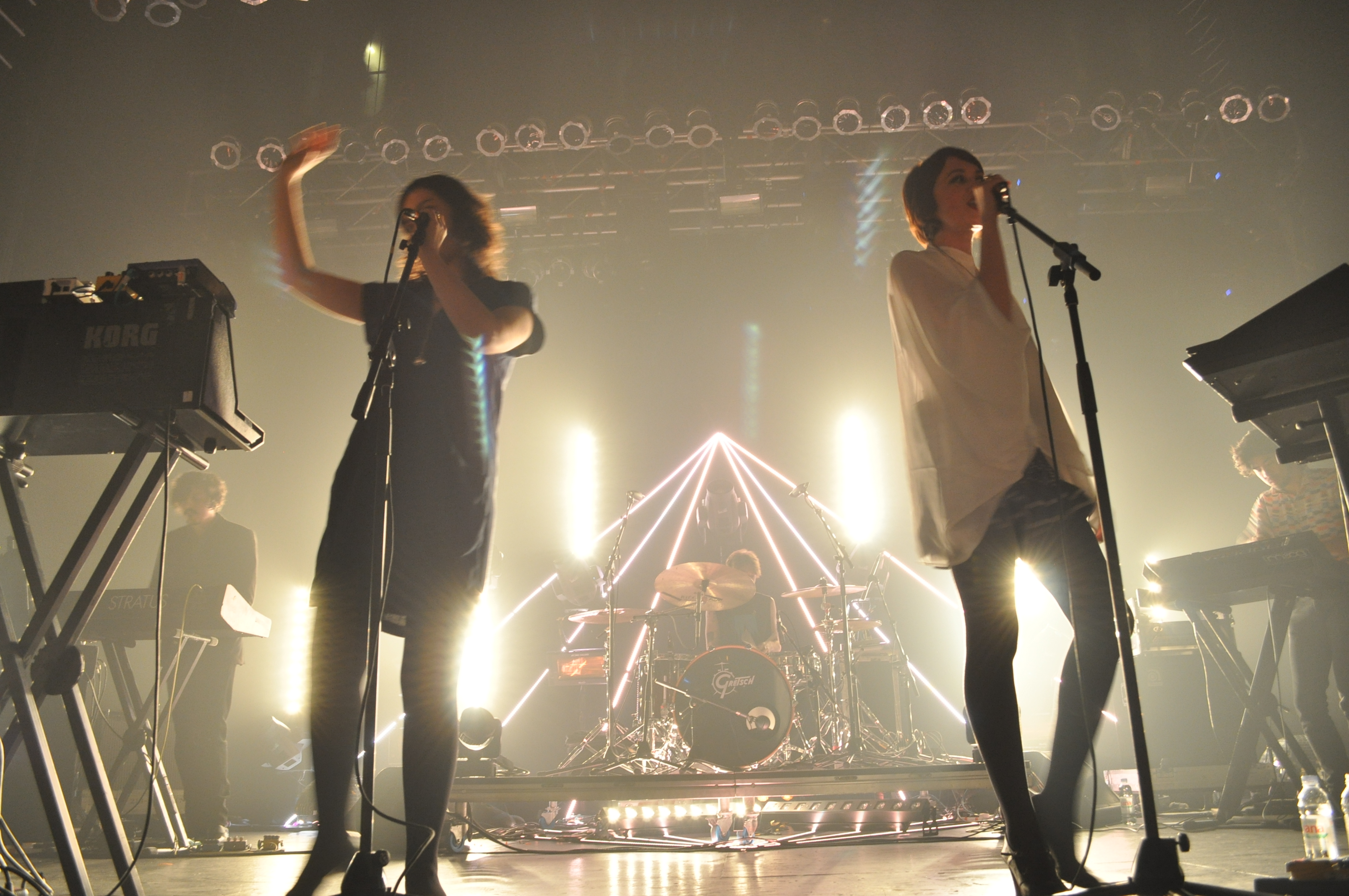 Ladytron